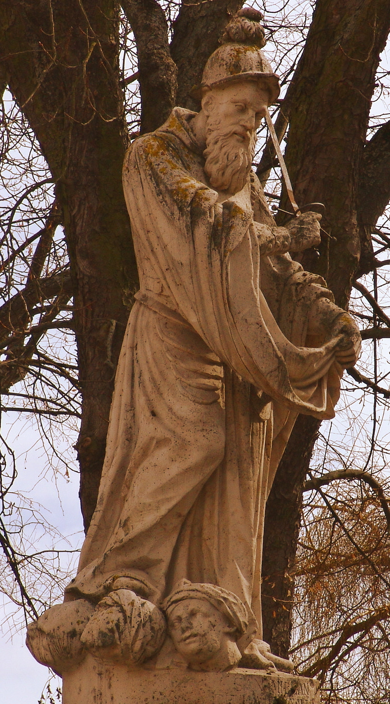 Estatua de San Millán, patrón de Castilla, Paseo del Espolón, Burgos, España.